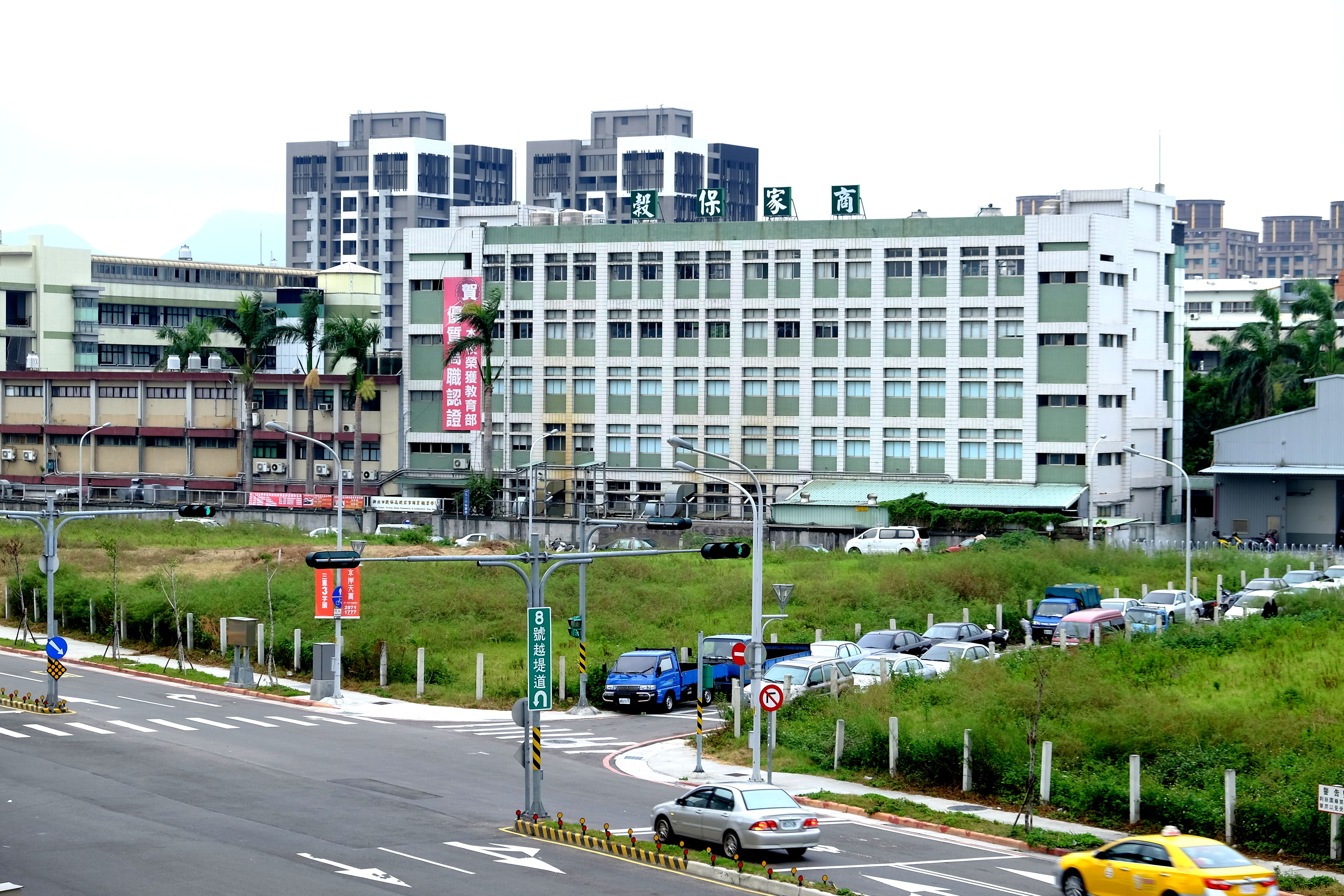 中文（台灣）: 新北市私立穀保高級家事商業職業學校。